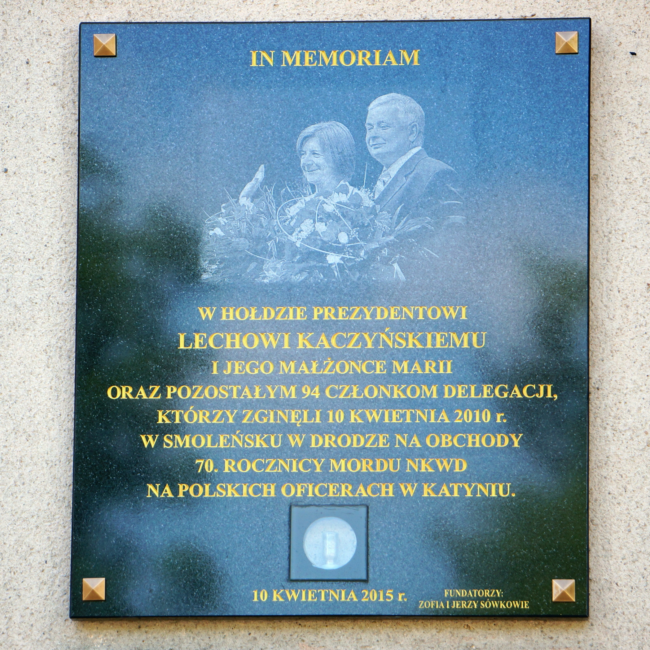 Tablica upamiętniająca ofiary katastrofy smoleńskiej, odsłonięta 10. 04. 2015 r. na "ścianie pamięci" kościoła św. Antoniego w Ostrowie Wlkp. ( jest to tablica, która zastąpiła pierwotną, mającą w tekście błąd ortograficzny [Słowo "hołd" napisano przez "ch". W czasie uroczystości odsłonięcia tablicy, "c" zasłonięto czarną taśmą])